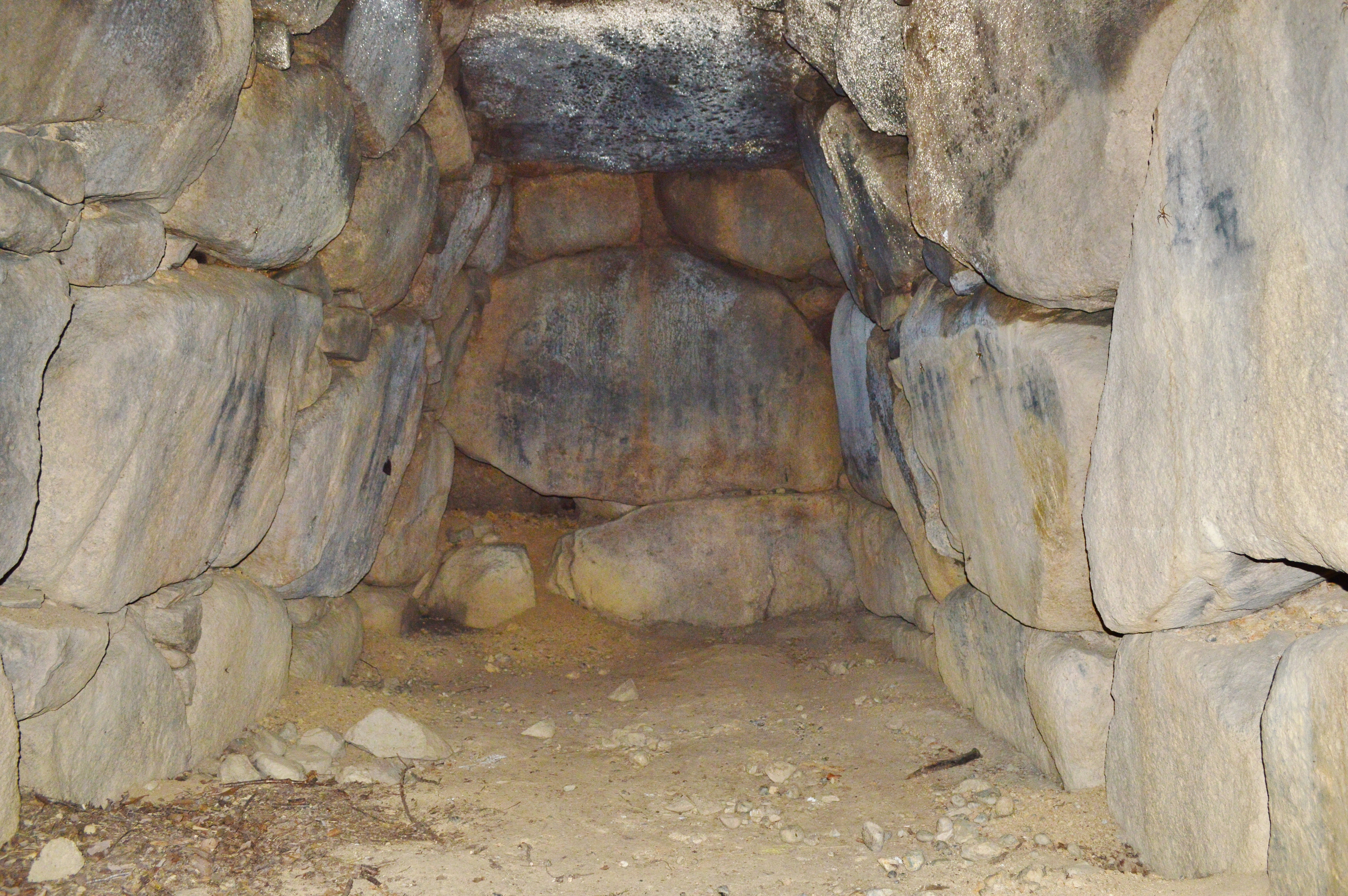 ウワナリ塚古墳 石室玄室